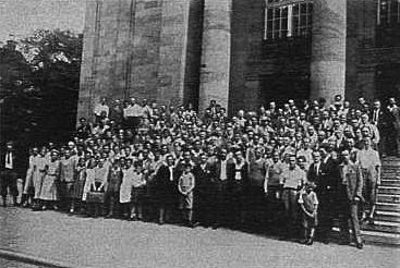 Komuna foto de la 12-a SAT-kongreso en Stutgarto, 1932. Mankas flagoj kaj afiŝoj, kiujn la registaro malpermesis alporti.